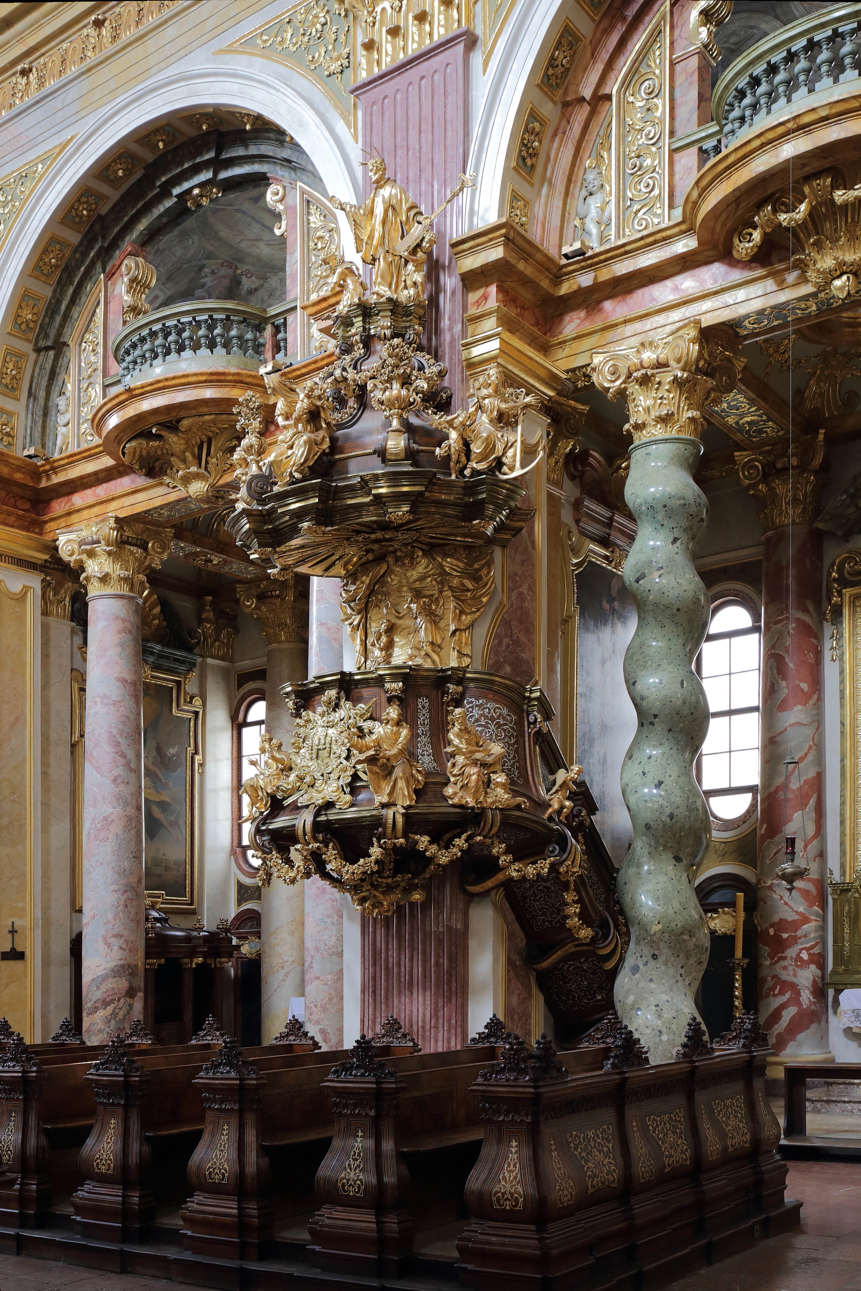 Kanzel der Jesuitenkirche, auch Universitätskirche bezeichnet, im 1. Wiener Gemeindebezirk Innere Stadt.Die Kanzel wurde aus Nussholz gefertigt und ist ein Werkt aus dem Anfang des 18. Jahrhunderts. Am Kanzelkorb sind die Evangelisten dargestellt und auf dem Schalldeckel die allegorischen Figuren Glaube, Hoffnung und Liebe. Die Bekrönung bildet die Statue des heiligen Franz Xaver, der einen Heiden tauft. Die Einlegearbeit besteht aus Perlmutt.